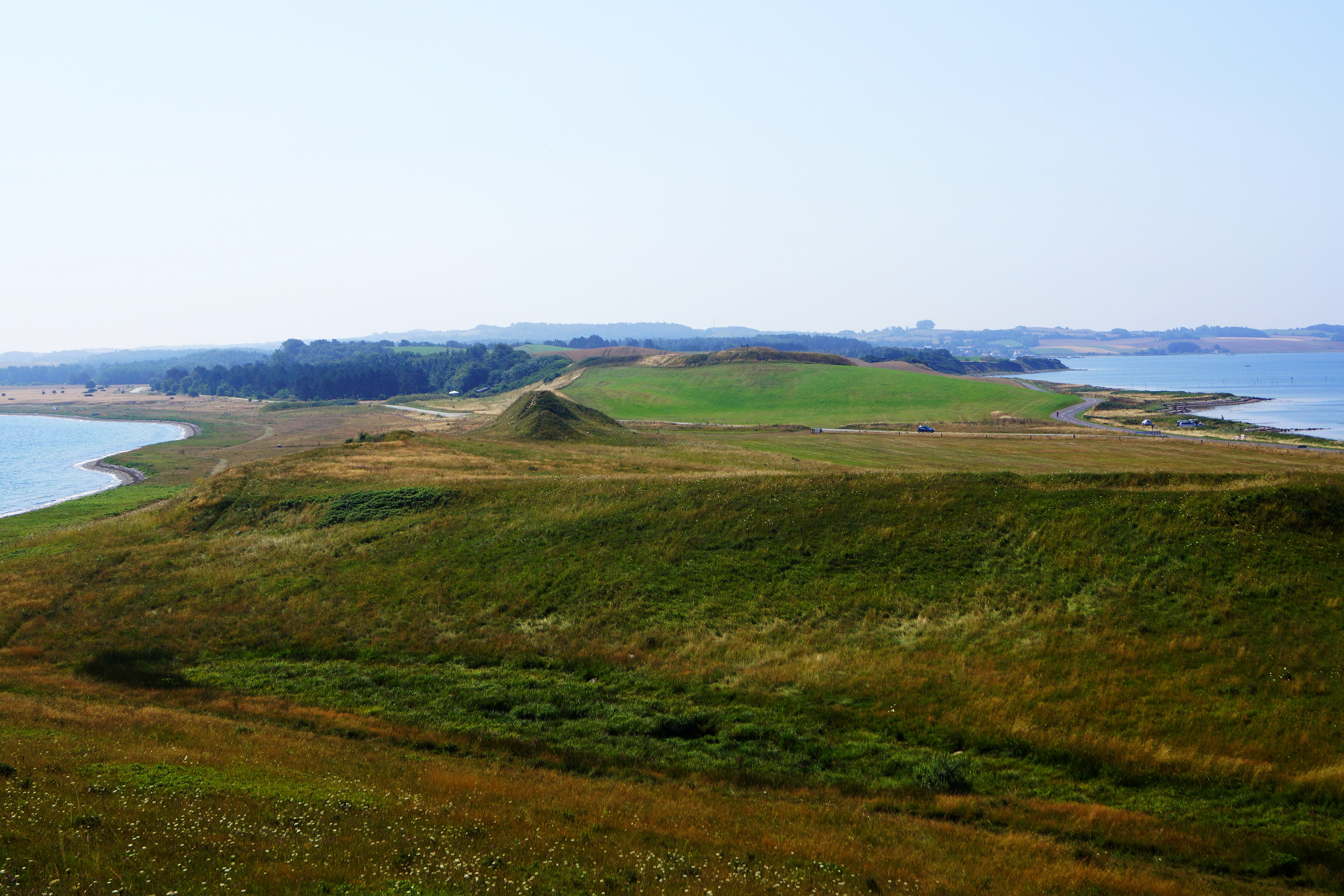 Dragsmur mod Helgenæs.jpg